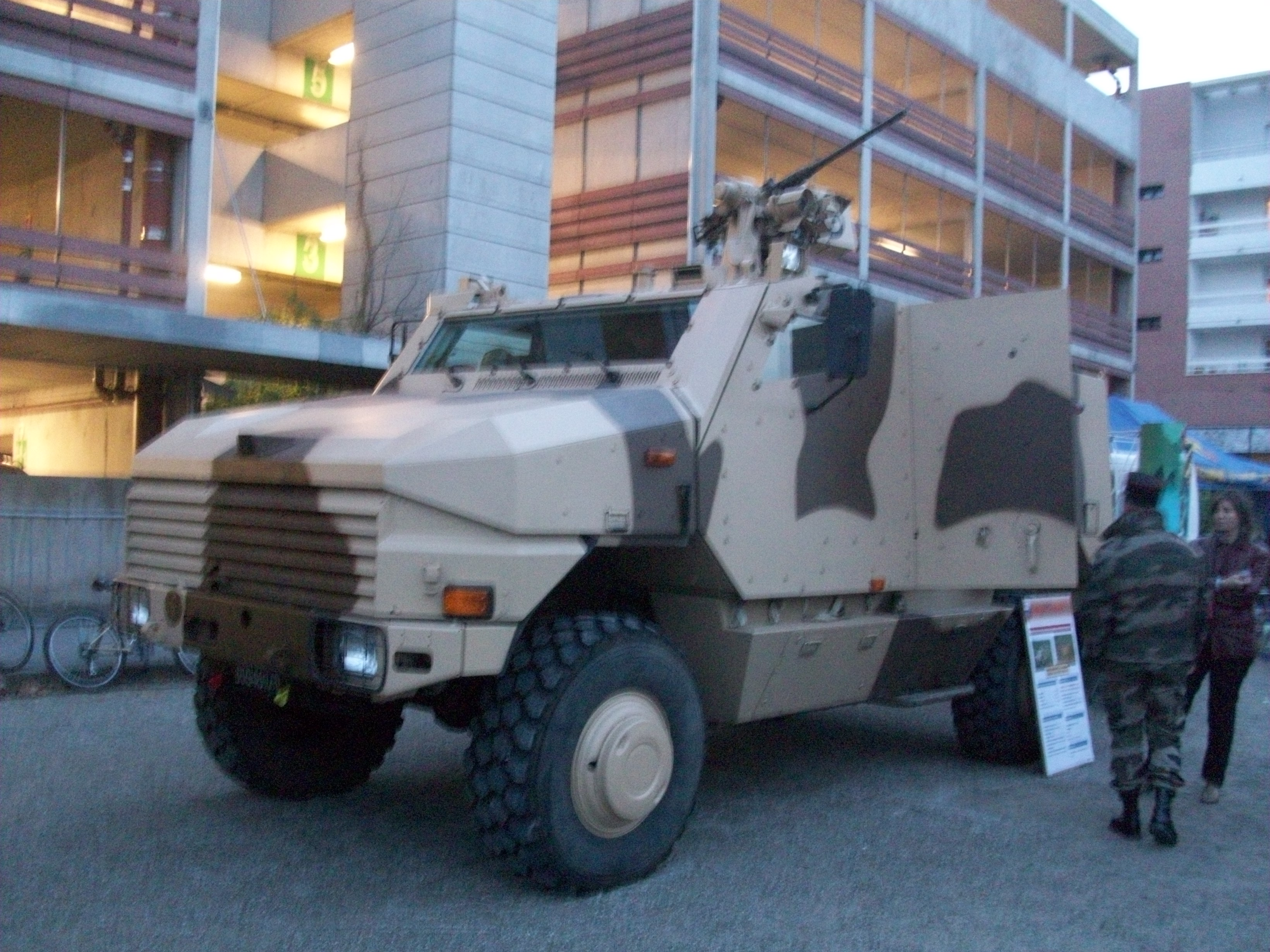 Présentation de véhicules de l'armée française devant Rivétoile, Strasbourg